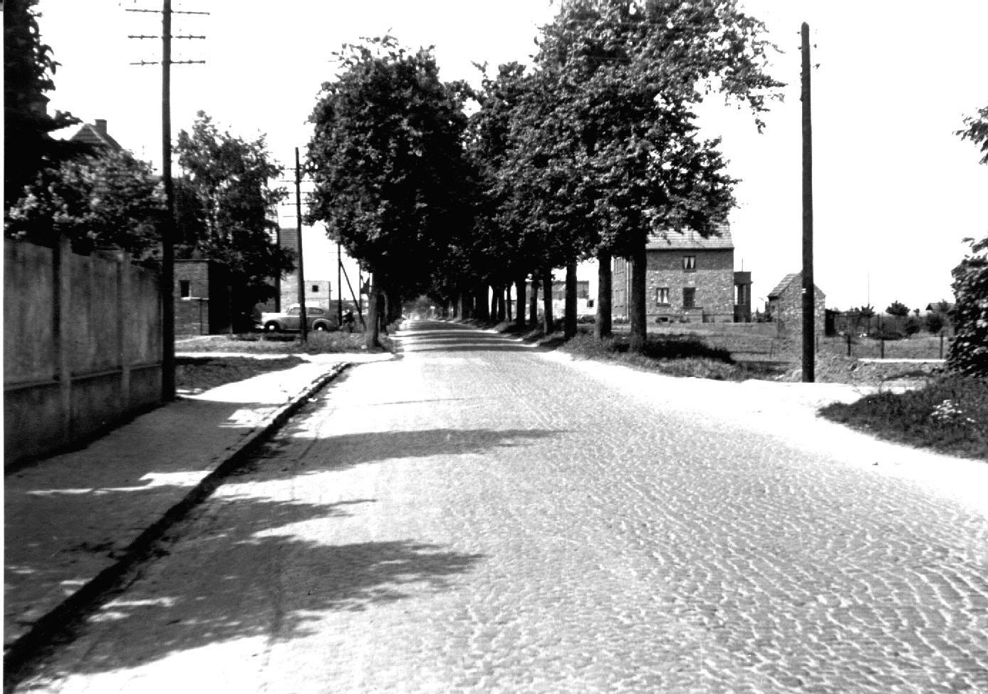 Die Bahnhofstraße in Nörvenich ortsauswärts ab Haus Nr. 27